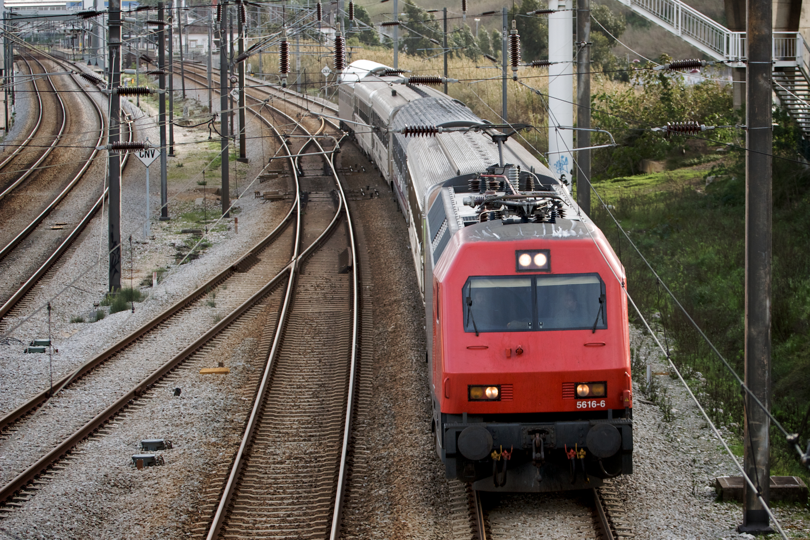 uma das últimas circulações do Sud com este tipo de composição ecléctica. Tipo: Comboio Internacional Sud Expresso 310/311 [Lisboa • Santa Apolónia - Hendaye] Local: Bobadela [Linha do Norte, PK 10] Data e hora: 27 de Fevereiro de 2010 [17h00] Material: Locomotiva 5616 + 5 carruagens (1 Sorefame Renovada, 1 RENFE Litera, 1 Sorefame de Compartimentos, 1 Sorefame Restaurante-Bar, 1 carruagem-cama U-Hansa) O ter deveres, que prolixa coisa! Agora tenho eu que estar à uma menos cinco Na Estação do Rossio, tabuleiro superior — despedida Do amigo que vai no "Sud Express" de toda a gente Para onde toda a gente vai, o Paris ... Tenho que lá estar E acreditem, o cansaço antecipado é tão grande Que, se o "Sud Express" soubesse, descarrilava... Brincadeira de crianças? Não, descarrilava a valer... Que leve a minha vida dentro, arre, quando descarrile!... Tenho desejo forte, E o meu desejo, porque é forte, entra na substância do mundo. Álvaro de Campos, in "Poemas" Sud Expresso: um comboio chamado liberdade Elogio do Sud Expresso